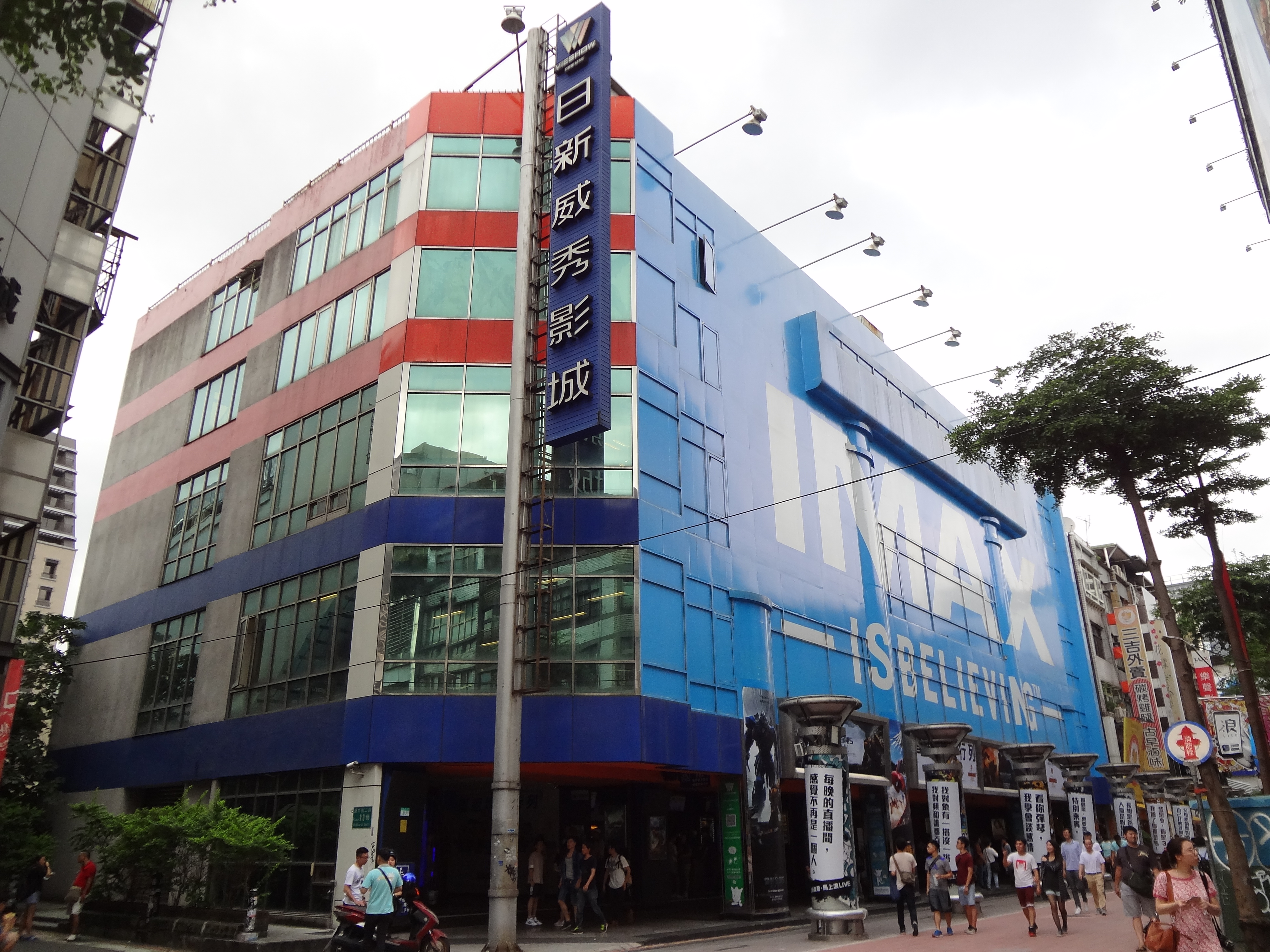 台北日新威秀影城。